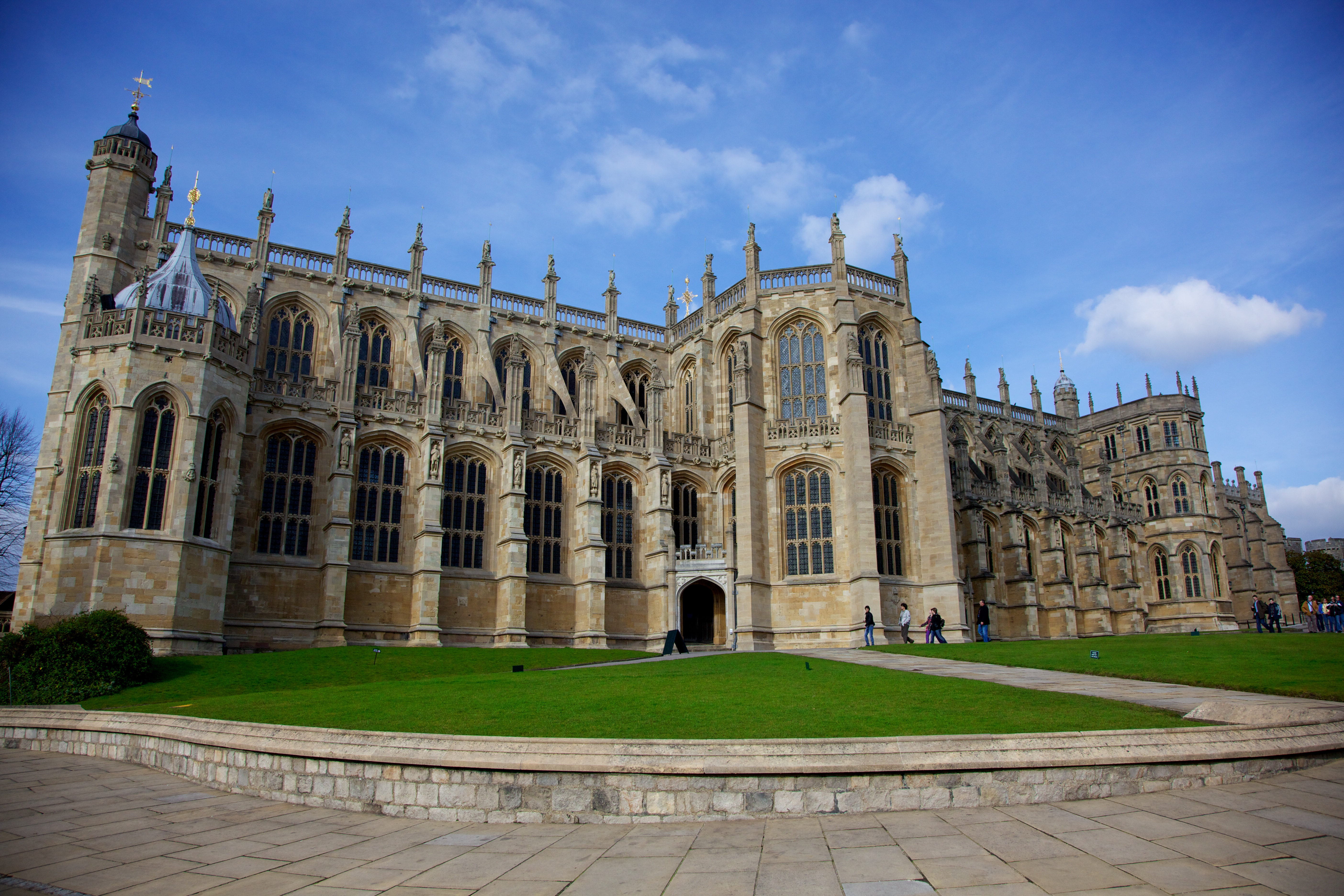 Windsor